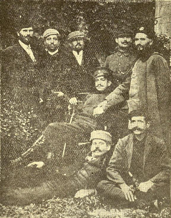 Костурски войводи, снимани през април 1913 година в Ксанти преди заминаването на Сборната партизанска рота на Македоно-одринското опълчение. Прави Трайко Желевски от Желево, Пандо Сидов от Жупанища, Андон Юруков от Лабаница, Тома Янакиев от Желин и Георги Шкоронов (Дякон Евстатий) от Нестрам. Седналият е подпоручик Лазар Поповски.